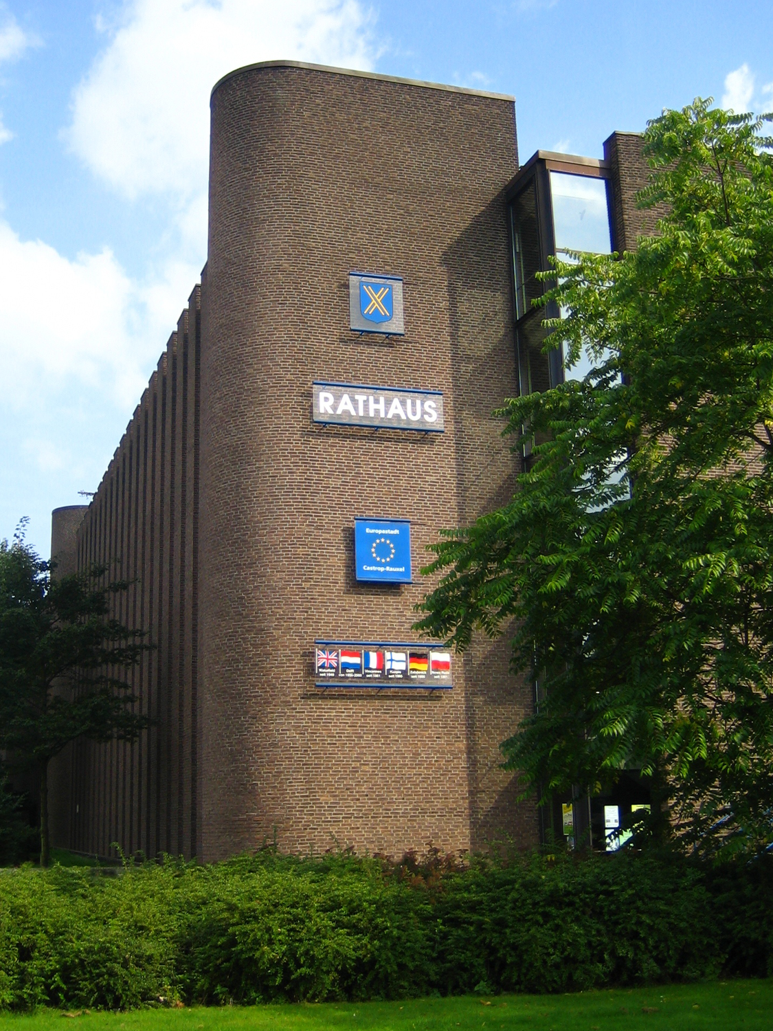 Beschreibung, Quelle und Lizenz Beschreibung: Rathaus und Stadtverwaltung Castrop-Rauxel Quelle: selbst fotografiert Fotograf oder Zeichner: Christian Schürmann Datum: 04.09.2005 Lizenz: GFDL